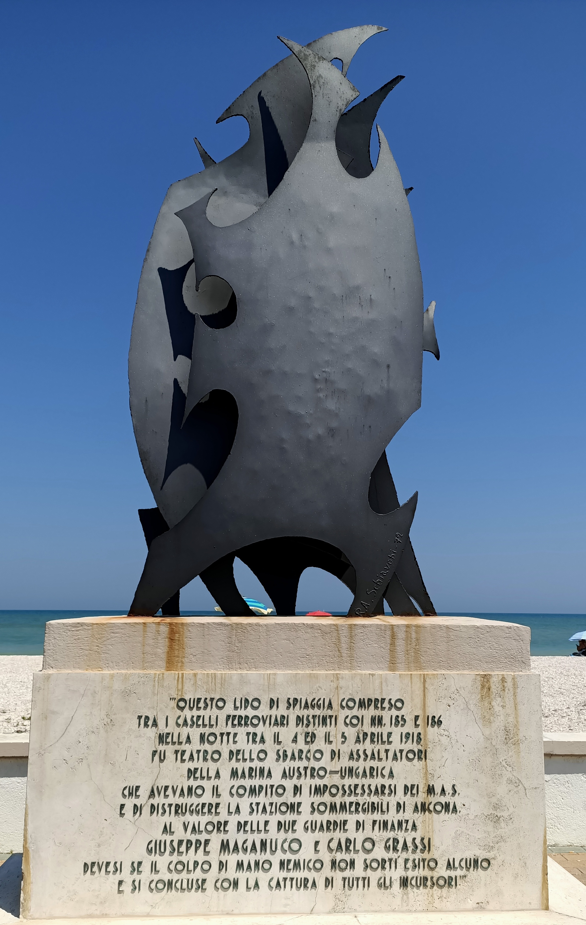 Monumento sulla spiaggia di Marzocca, Senigallia (An) che ricorda li luogo di sbarco degli incursori austro ungarici diretti ad Ancona la notte del 4/6/1918